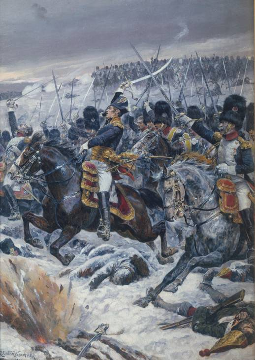 Maréchal Ney à Eylau par Richard Caton Woodville